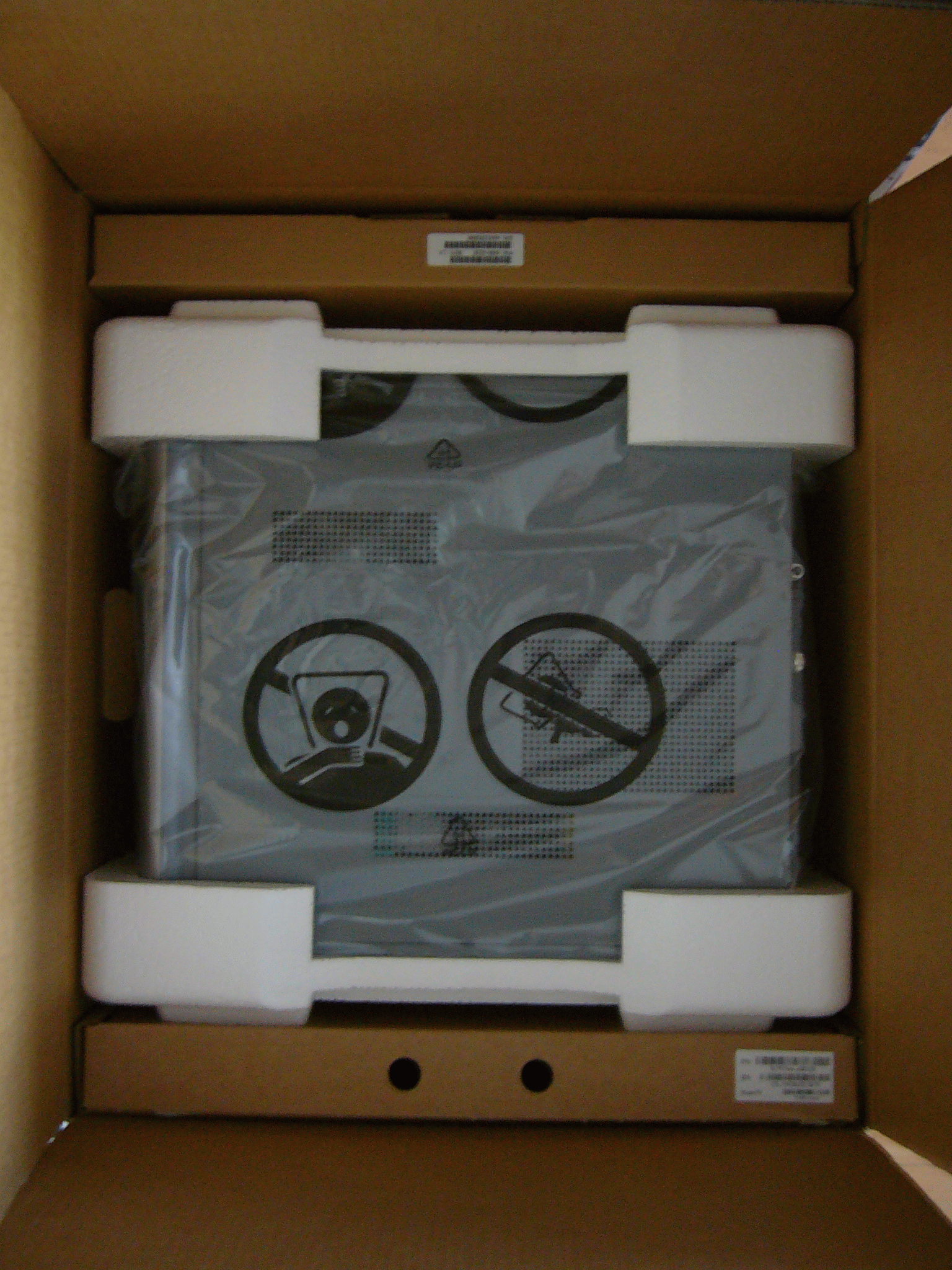 PC-Verpackung (Hewlett-Packard)